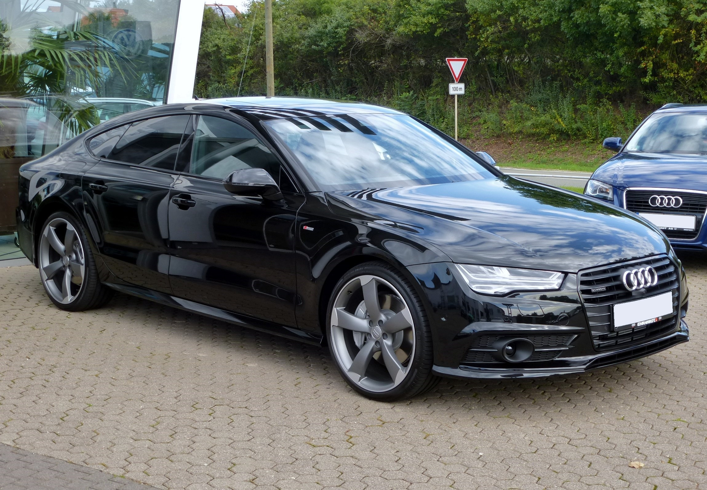 Audi A7 Facelift